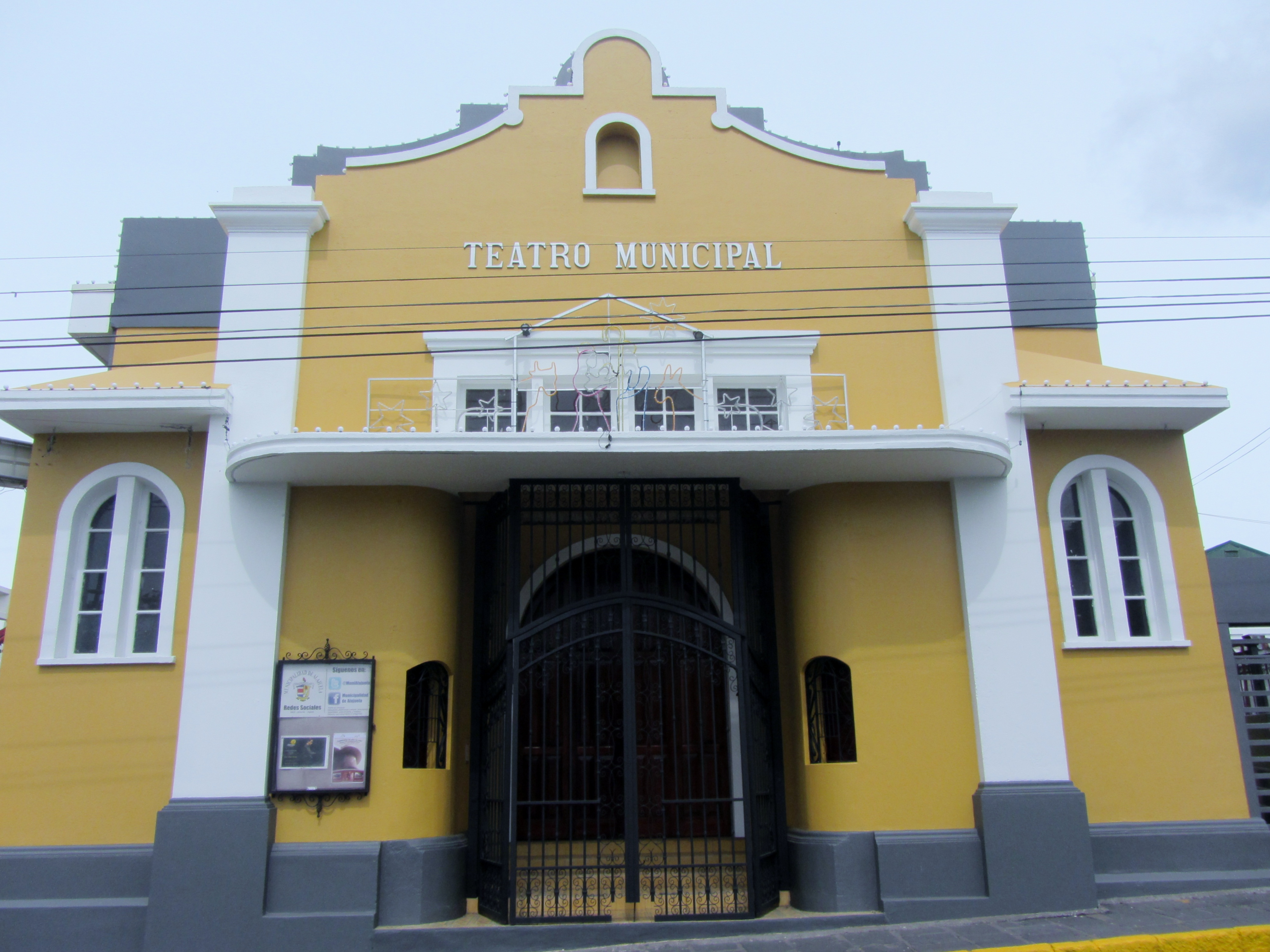 Teatro Municipal de Alajuela, Costa Rica